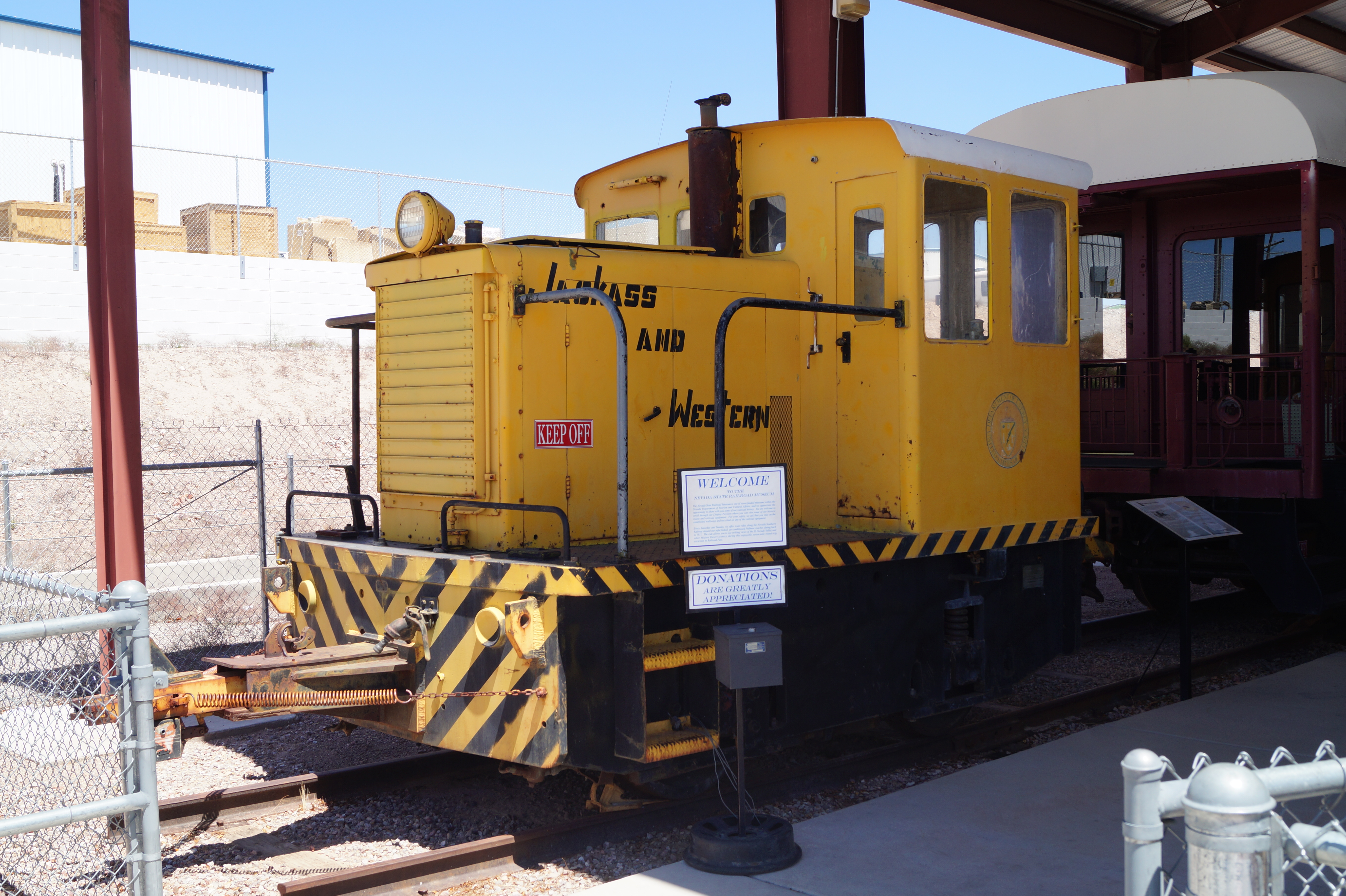 The Nevada State Railroad Museum which is an agency of the Nevada Department of Cultural Affairs. It is located at Yucca Street on the tracks of the historic Union Pacific Railroad branch Henderson-Boulder City near the former Boulder City Railroad Yards where the Hoover Dam construction equipment was unloaded in the 1930s.